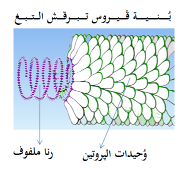 رسمٌ بياني لِبُنية الفيروس مُرقّش التبغ.